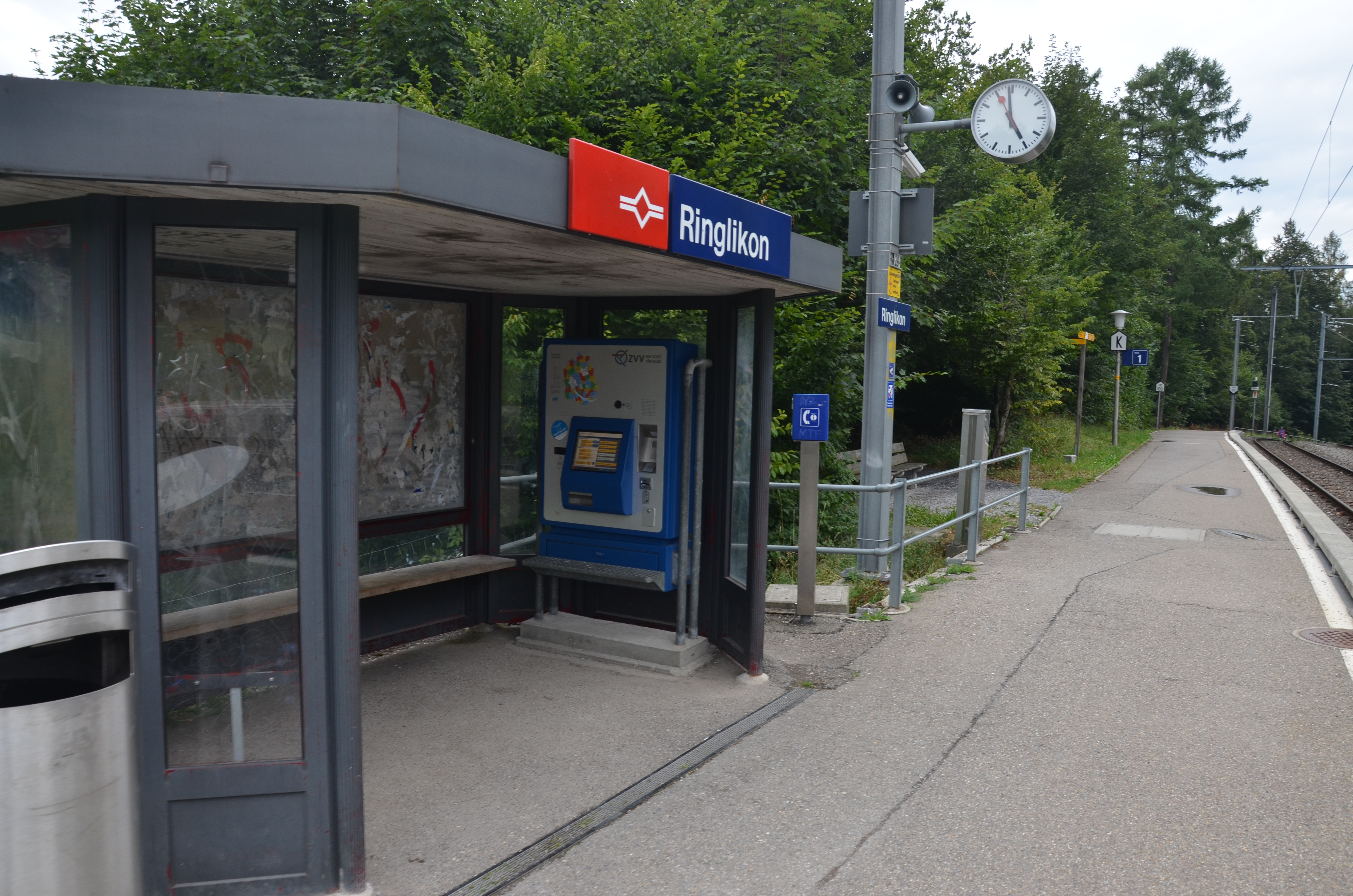 Het treinstation van Ringlikon anno 2015.